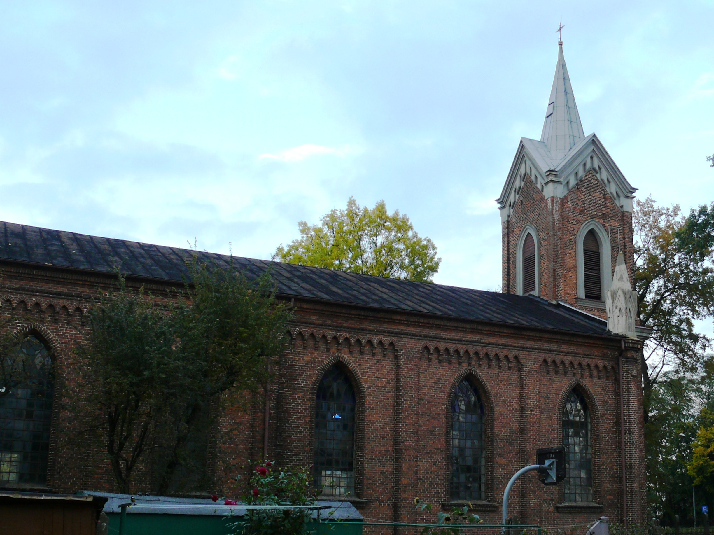 Kościół ewangelicki - luterański - Opatrzności Bożej w Kole